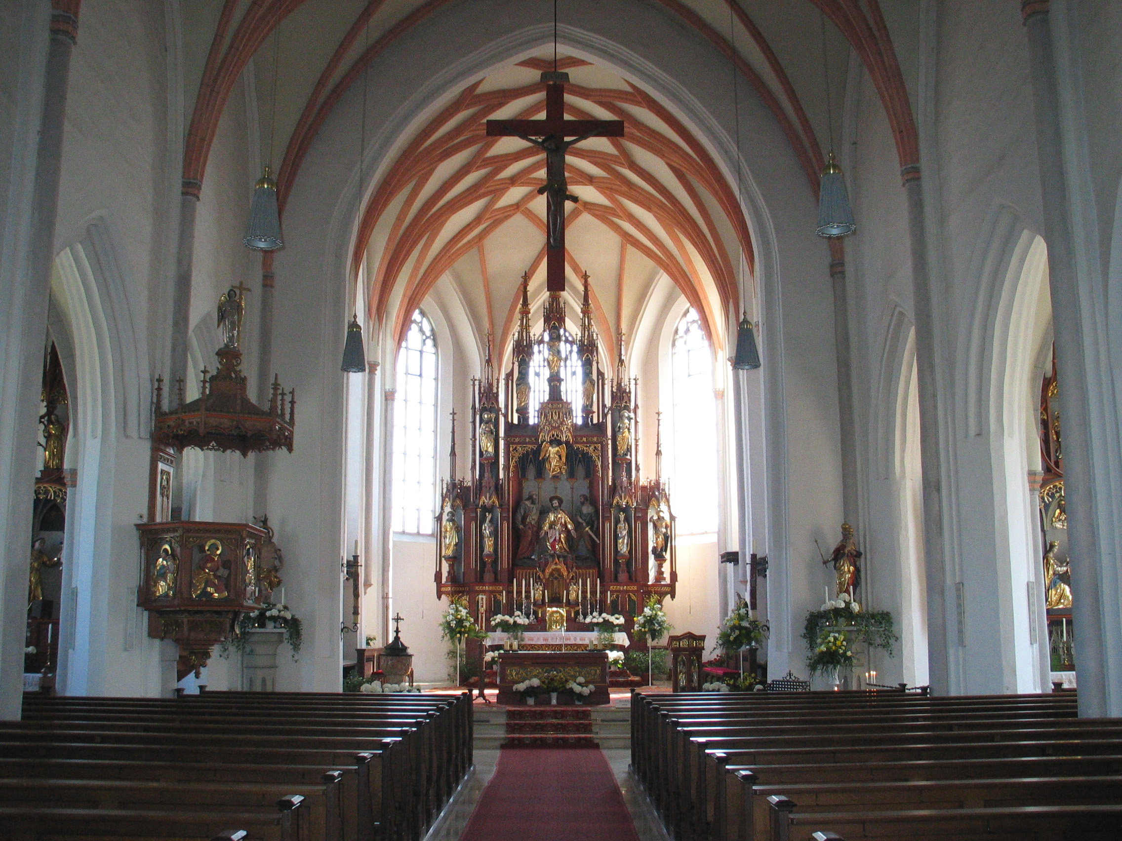 Frontenhausen, Kath. Pfarrkirche St. Jakob. Inneres gegen Osten.